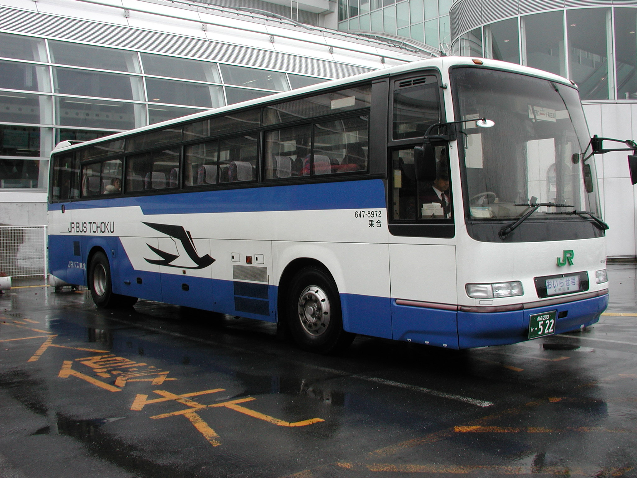 ジェイアールバス東北長距離対応路線車（日野・セレガ：KC-RU3FSCB/社番：647-8972）：十和田東線「おいらせ号」運用 八戸駅西口にて